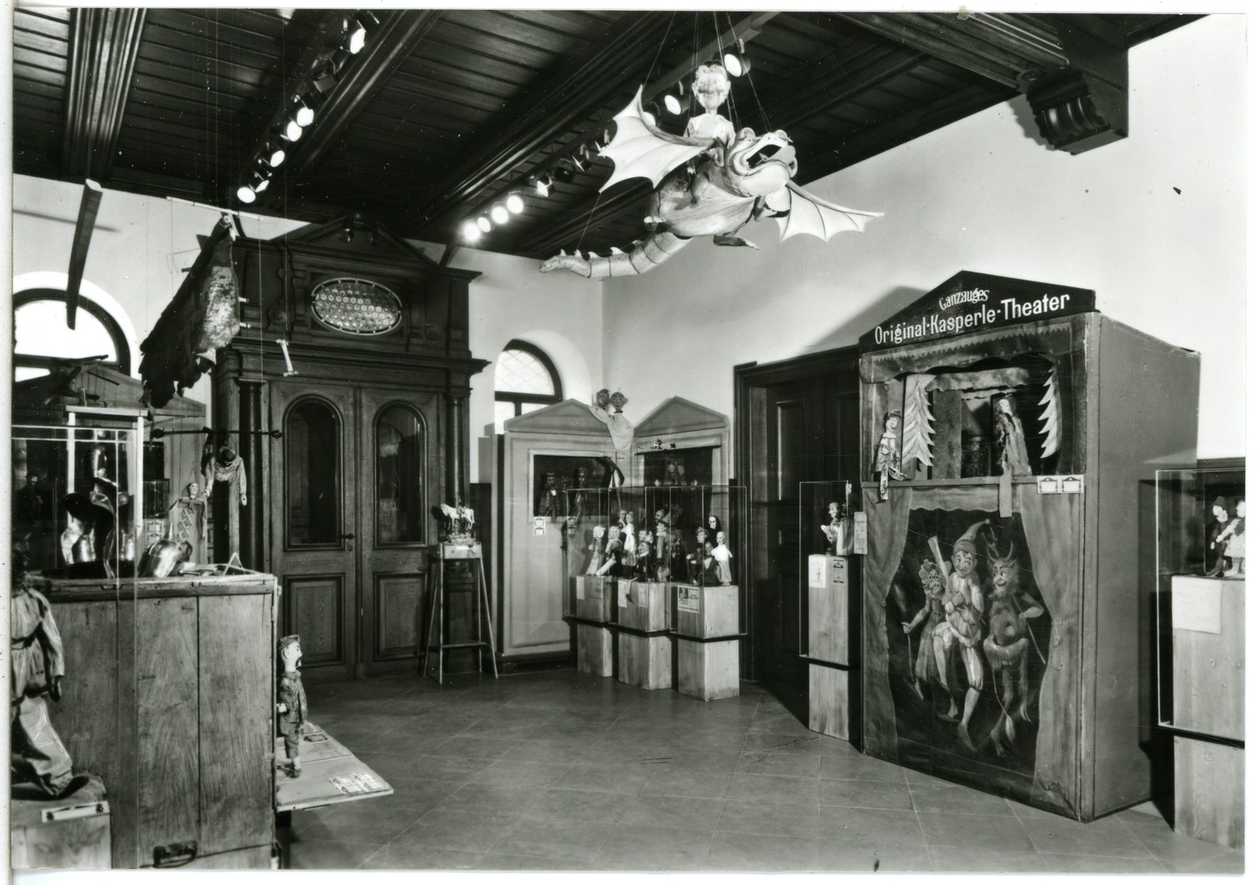 Radebeul; Hohenhaus, Puppentheatersammlung This postcard is from publisher Brück & Sohn in Meißen ( postcard has a unique number 30781 and is available in a higher resolution at the publisher. This images was uploaded in a cooperation project between Wikipedians and the publisher.